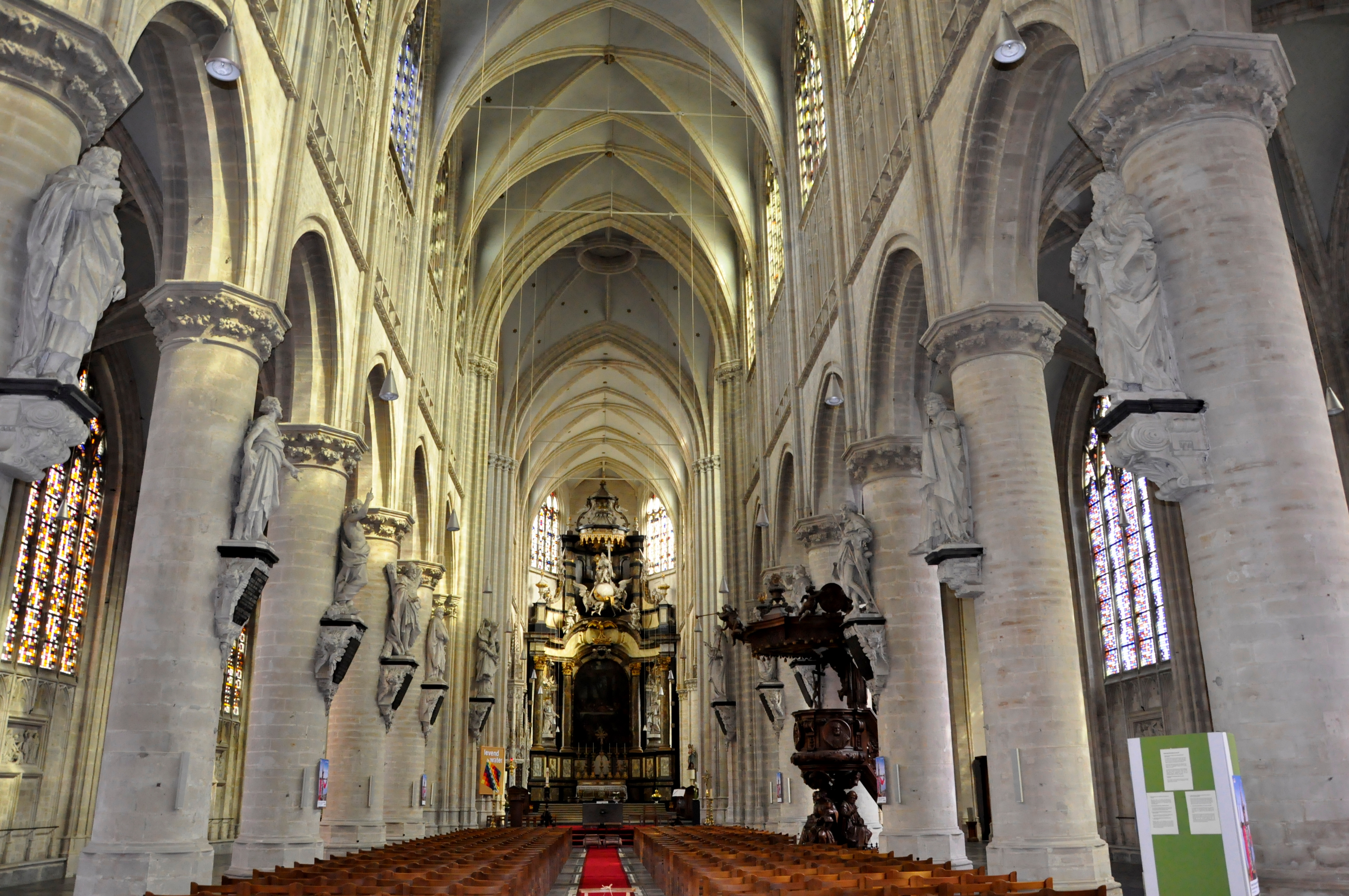 Onze-Lieve-Vrouw-over-de-Dijlekerk te Mechelen (België)